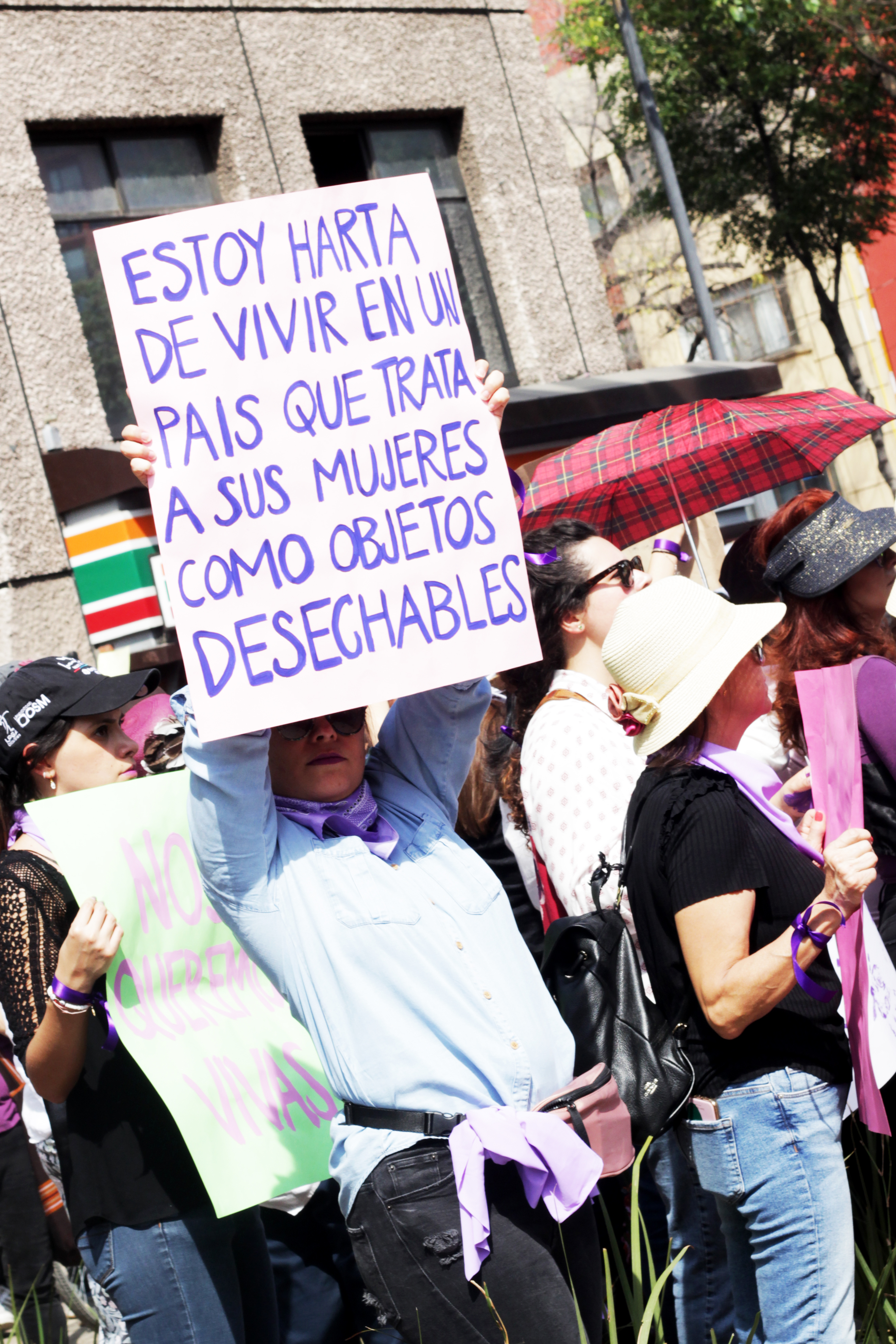 Marcha 8 de marzo de 2020